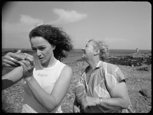 Sylvie Drapeau et France Arbour dans le film Les Fantômes des 3 Madeleine de Guylaine Dionne